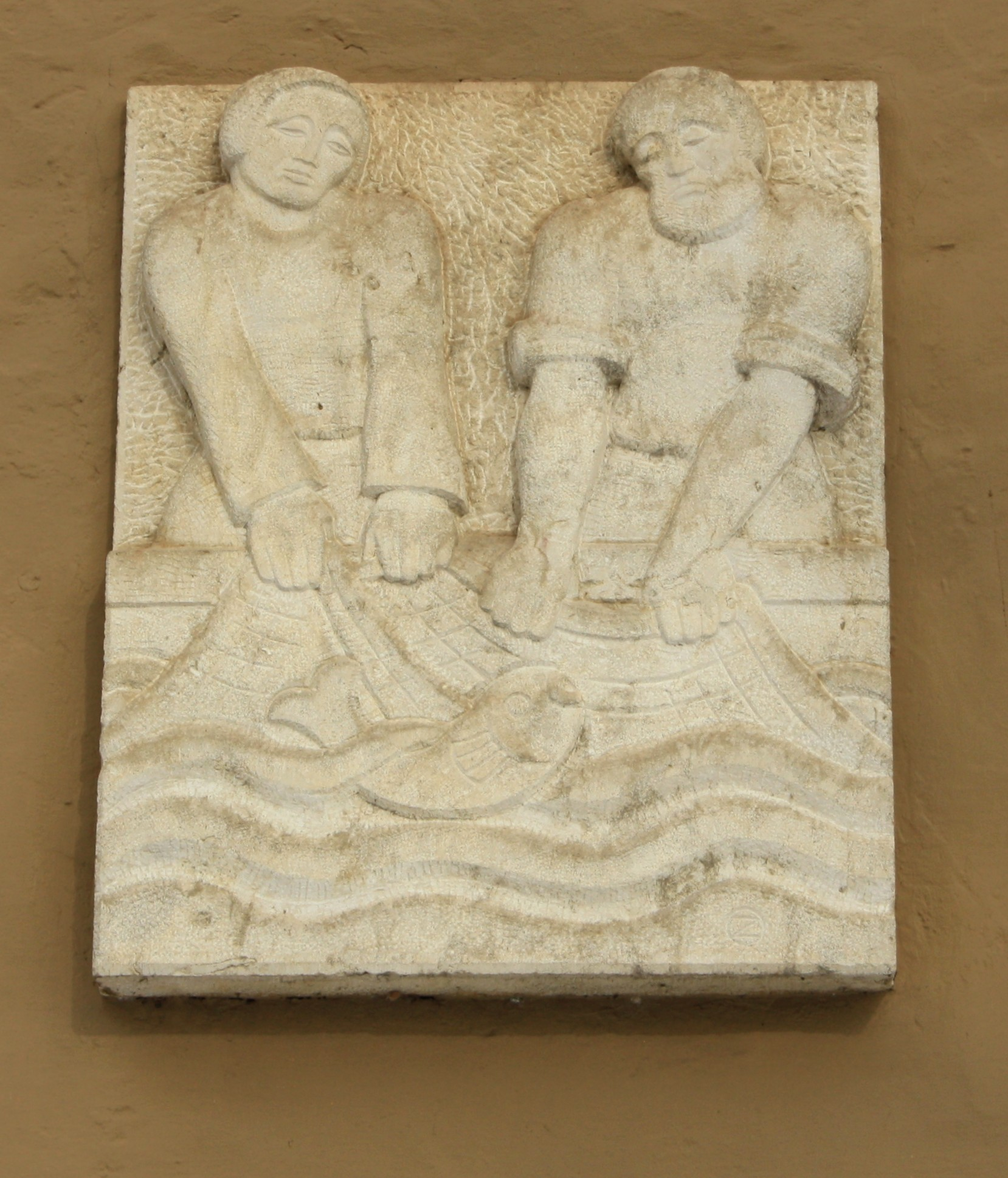 Relief Fischer (Kalkstein) des Bildhauers Otto Zirnbauer oberhalb des Eingangs des Pumpwerks in Obernzell, geschaffen 1956